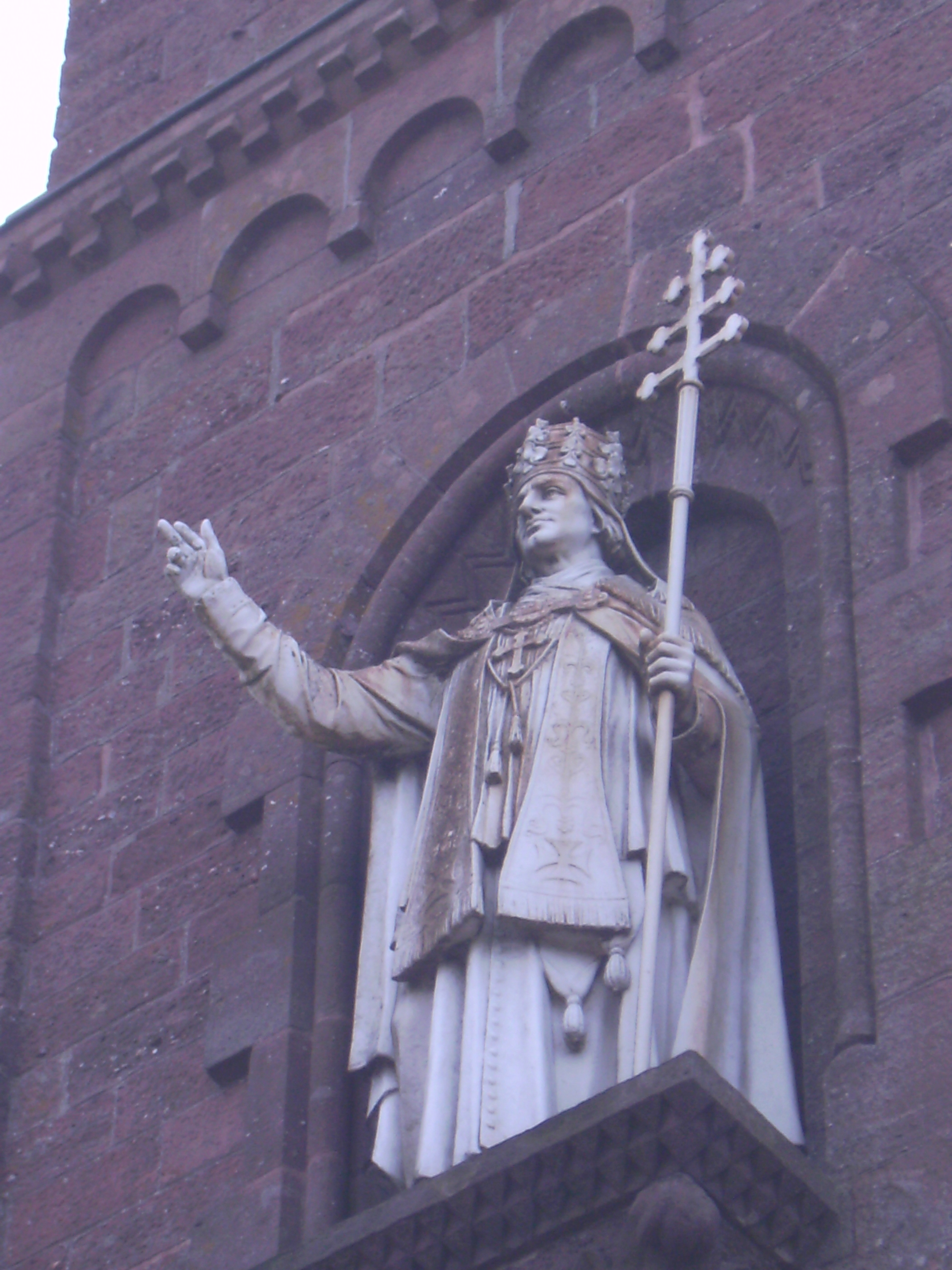 Dabo: Papst Leo IX. an der Außenwand des Turms der Kapelle auf dem "Le rocher" in Dabo